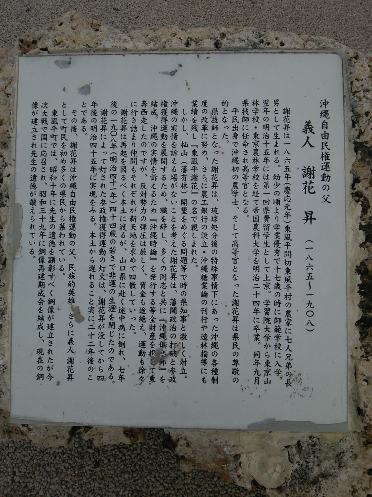 謝花昇先生之像之碑文